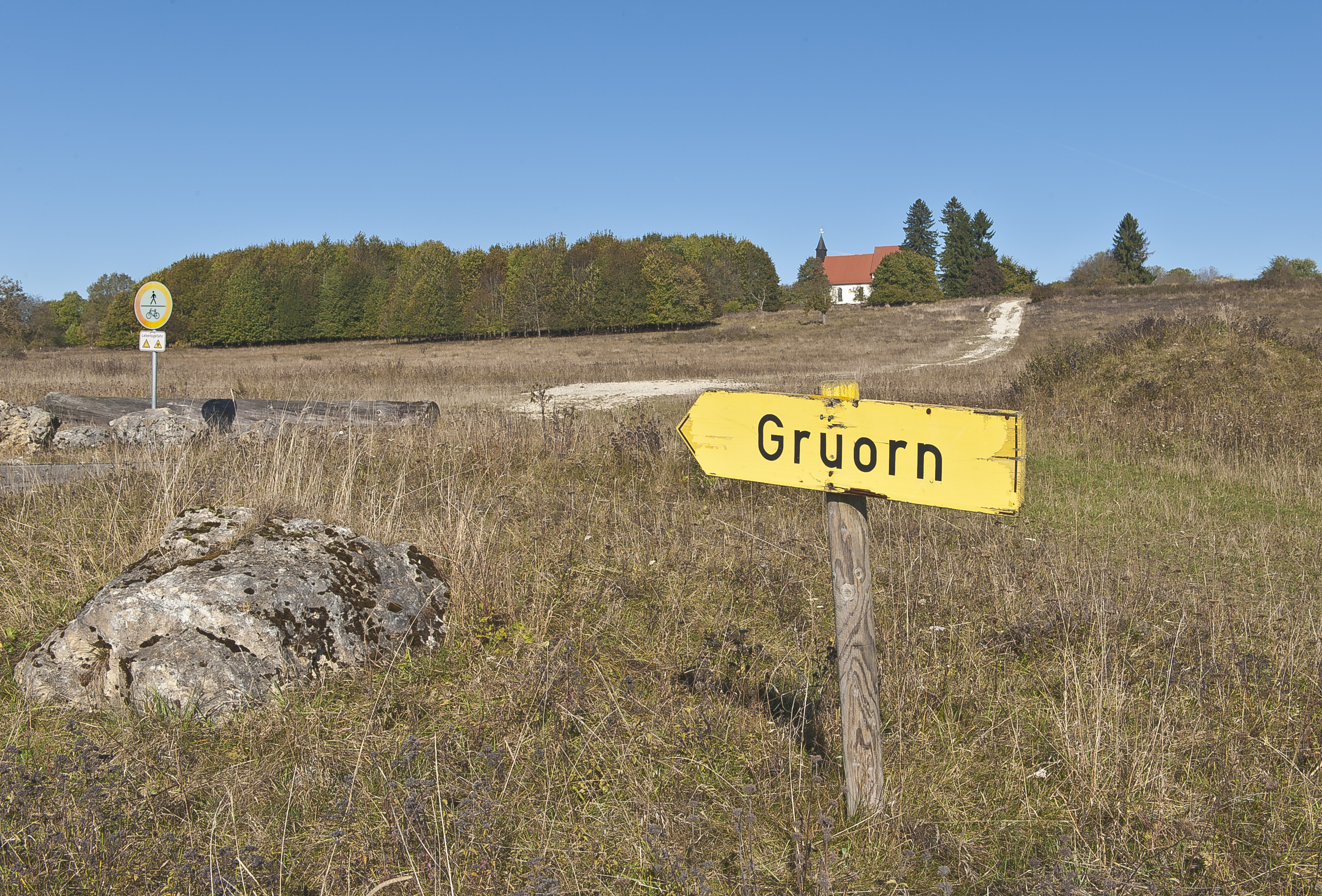 Gruorn auf dem ehemaligen Truppenübungsplatz Münsingen, Schwäbische Alb